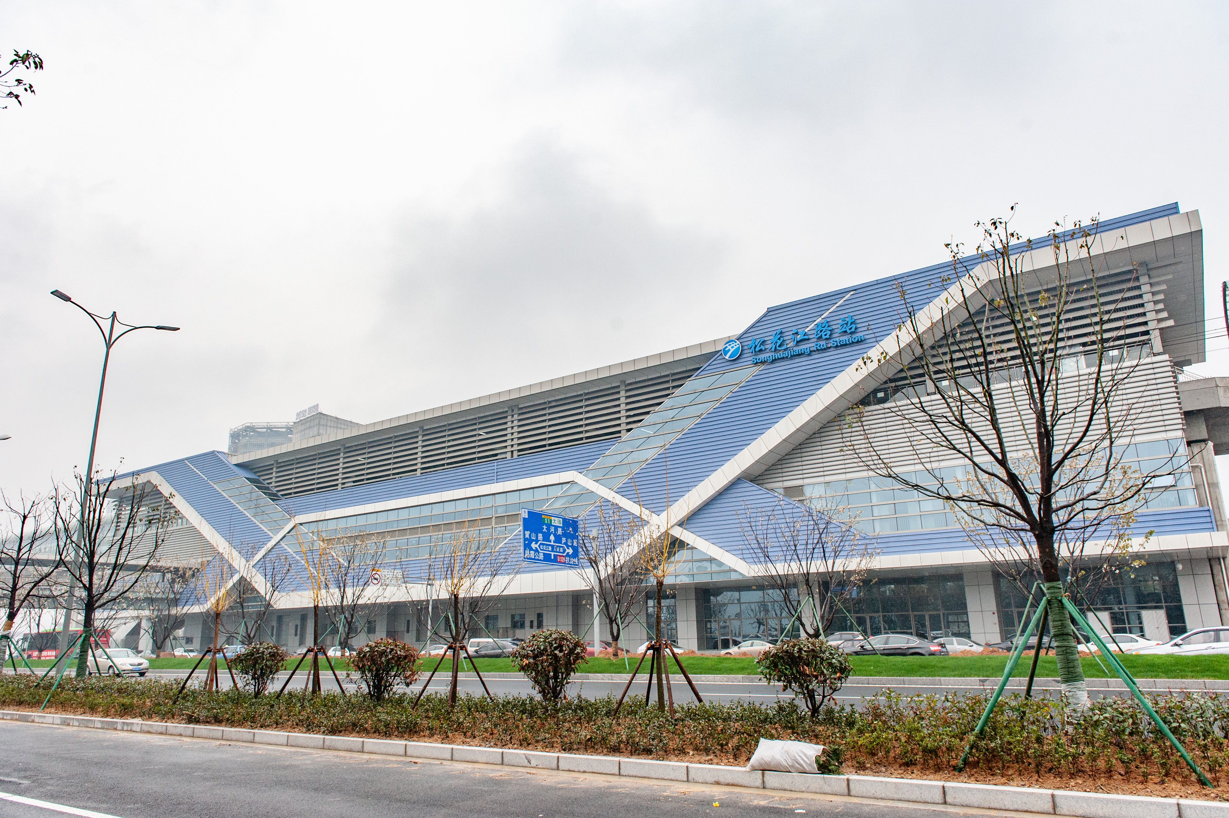 宁波地铁松花江路站